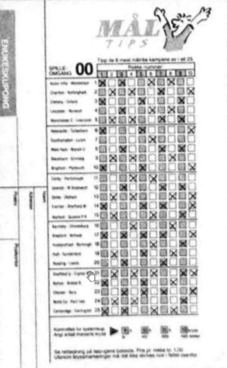 En kupong for spillet Måltips, som eksisterte fra 1989 til 1994.